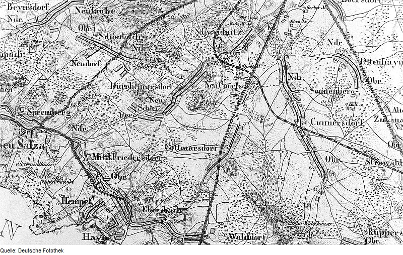 Original image description from the Deutsche Fotothek Obercunnersdorf. Topographische Karte vom Preußischen Staate, Blatt 265 Reichenbach, aufgen. 1815, grav. 1828